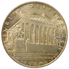 1 Schilling